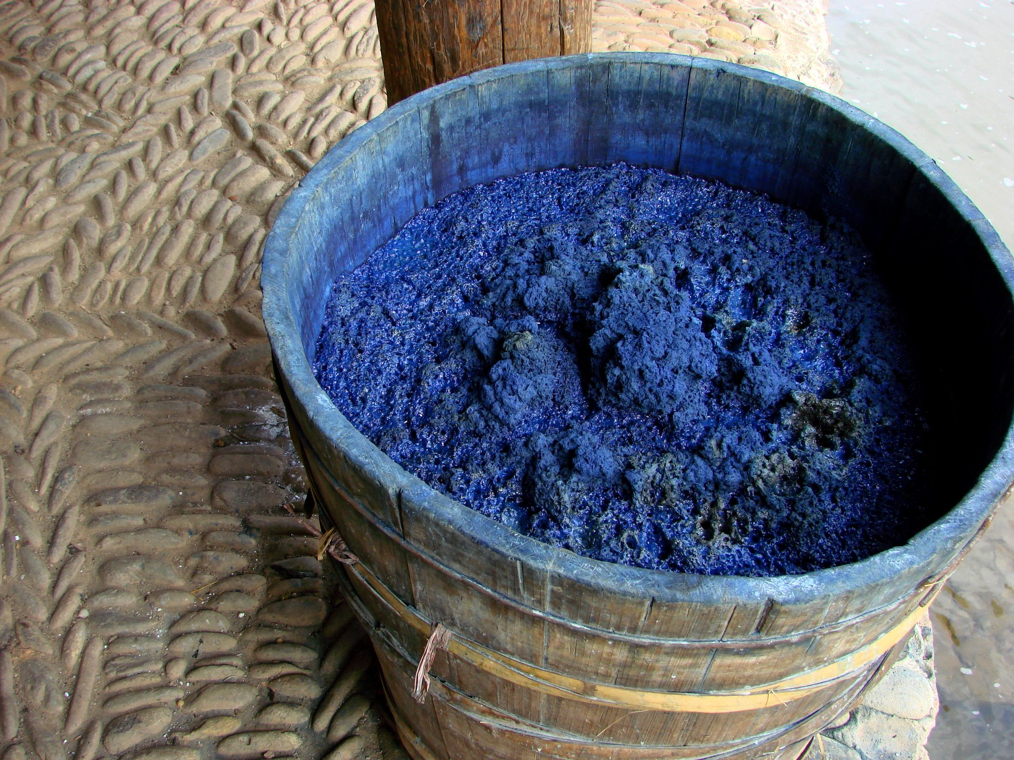 贵州黔东南州肇兴侗寨，正在发酵待使用的蓝靛